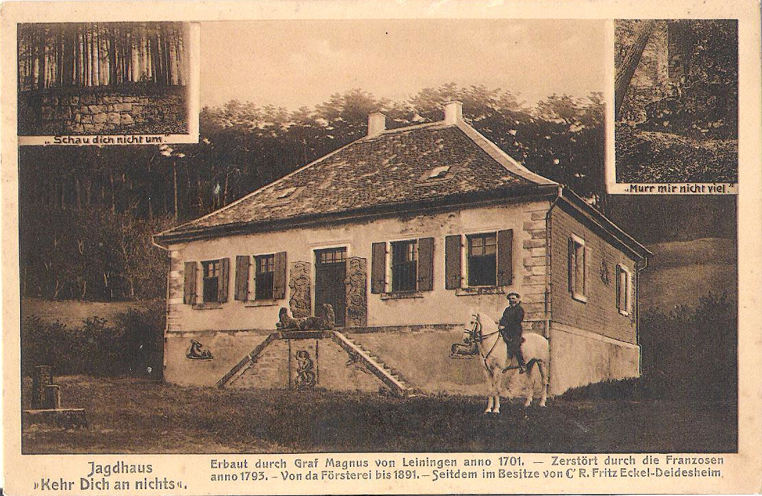 Jagdhaus „Kehr Dich an nichts“